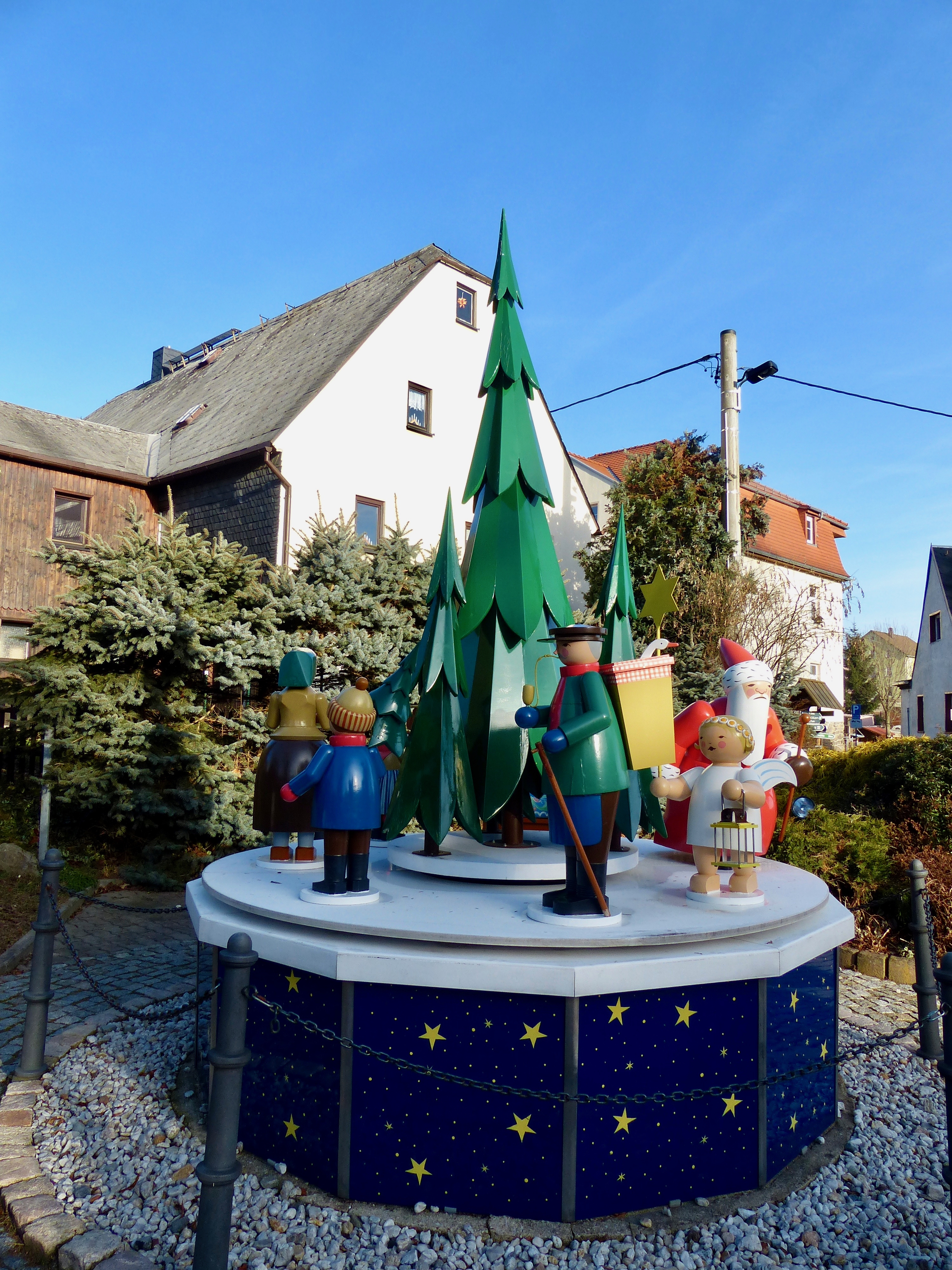 Übergroße Spieldose mit Wendt & Kühn-Figuren im Ortszentrum von Grünhainichen